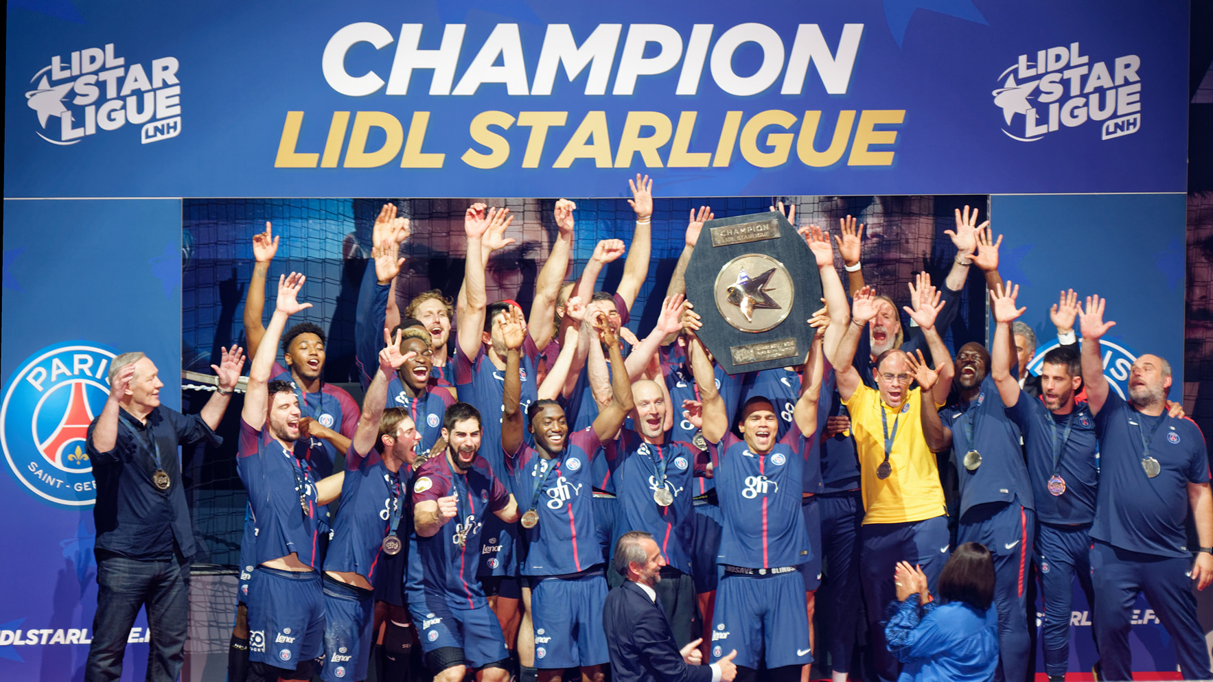 Le PSGHandball est sacré vainqueur de la Lidlstarligue 2017-18. Le 31 mai 2018 à Coubertin, Paris.